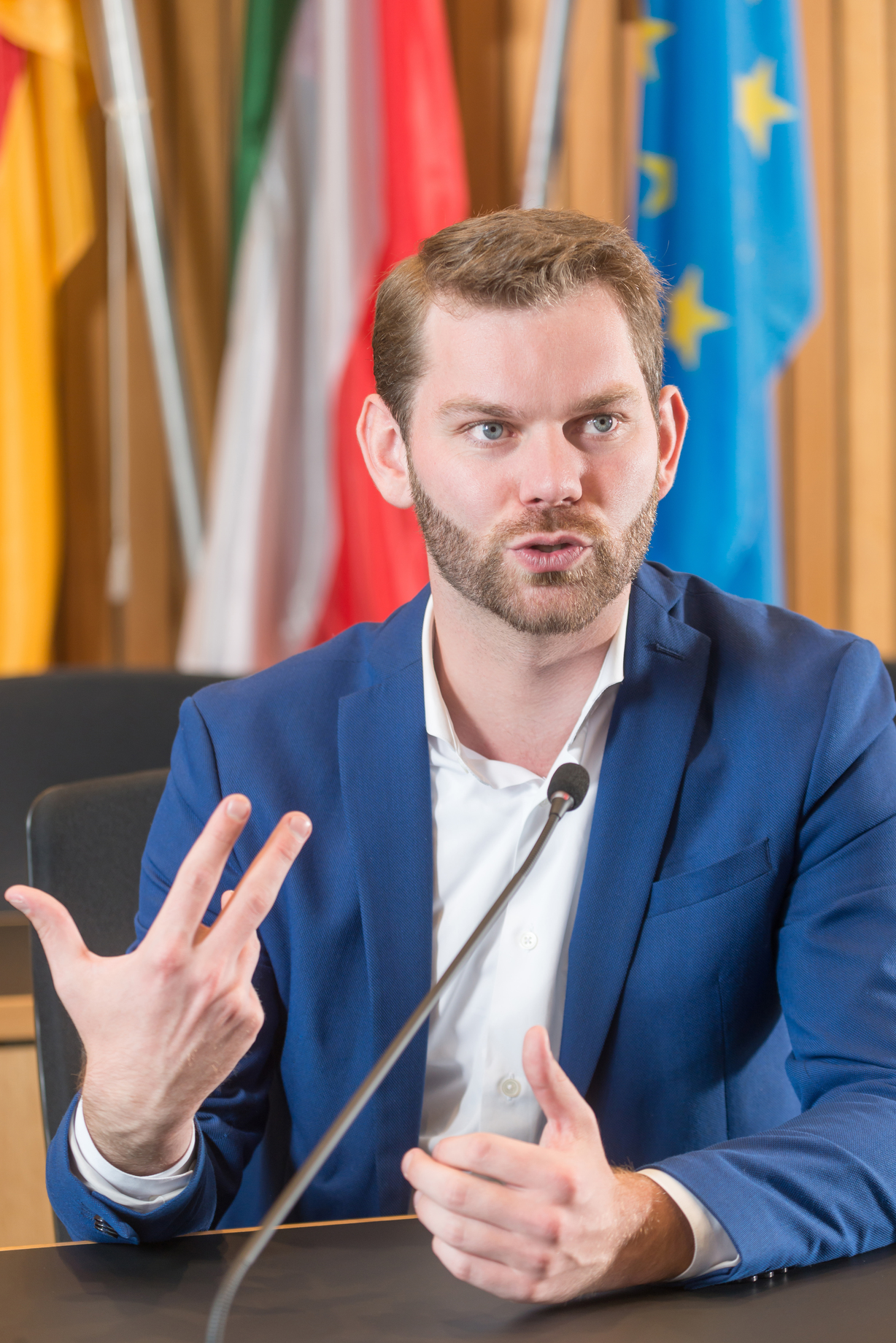 Florian Braun, CDU-Landtagsfraktion NRW